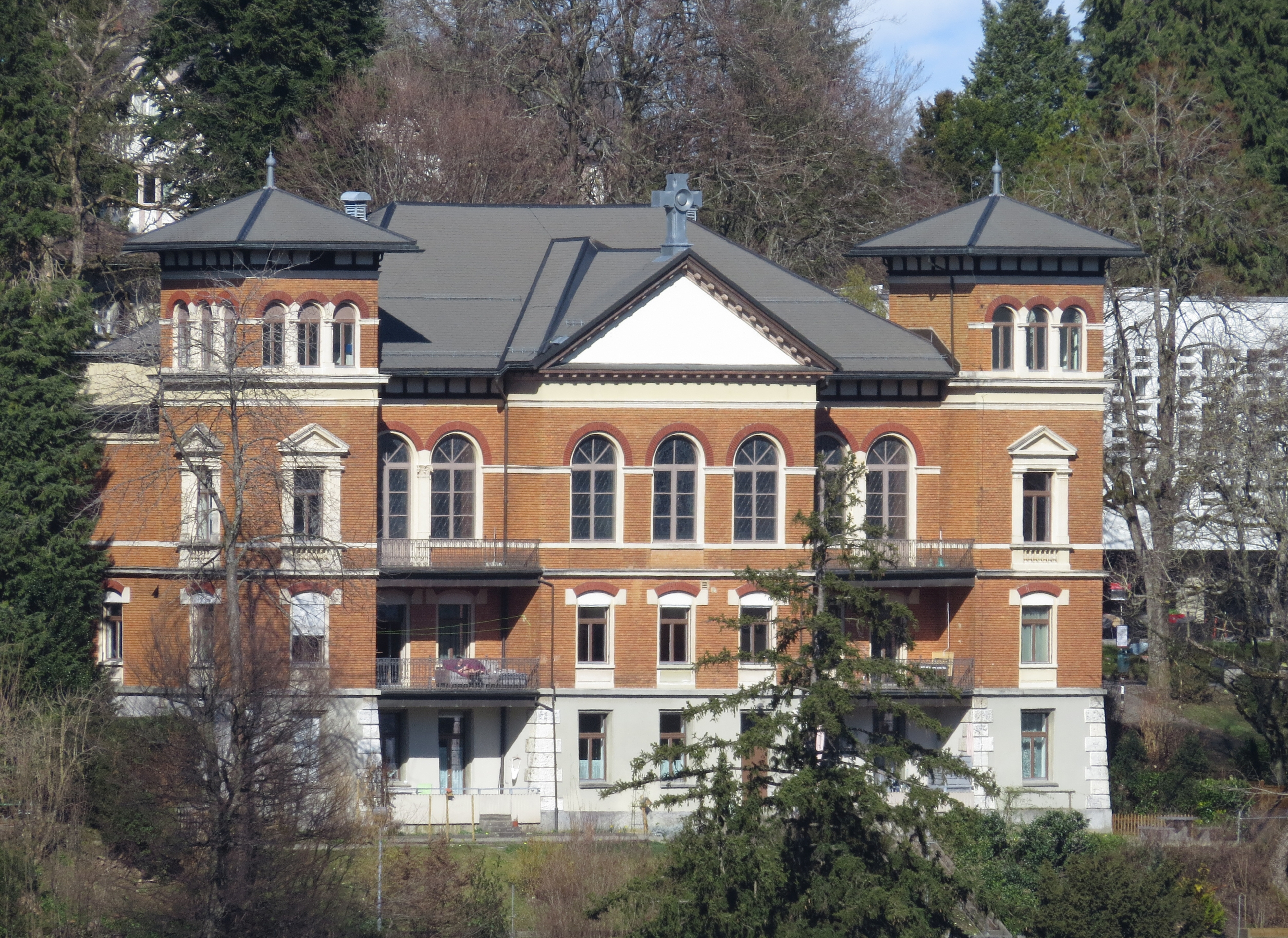 Fotografie der Christus-Kirche St. Gallen canon PowerShot SX50 HS F/8 1/320 Sek ISO-100 Brennweite 134 mm